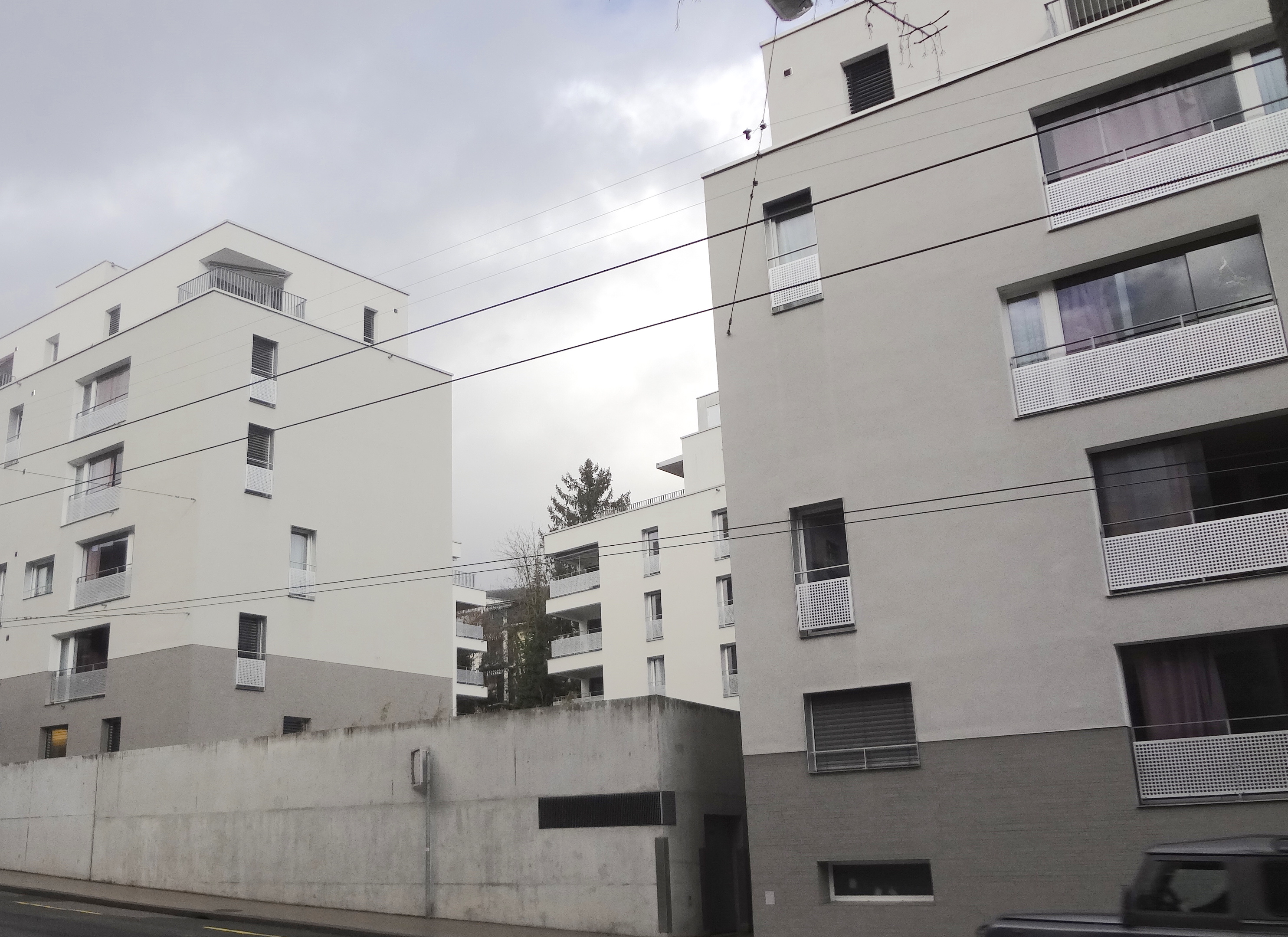 Rue de la Borde à Lausanne : quartier de 72 logements, garderie et CMS. Réalisé en 2010 par le bureau d'architectes Atelier Cube.